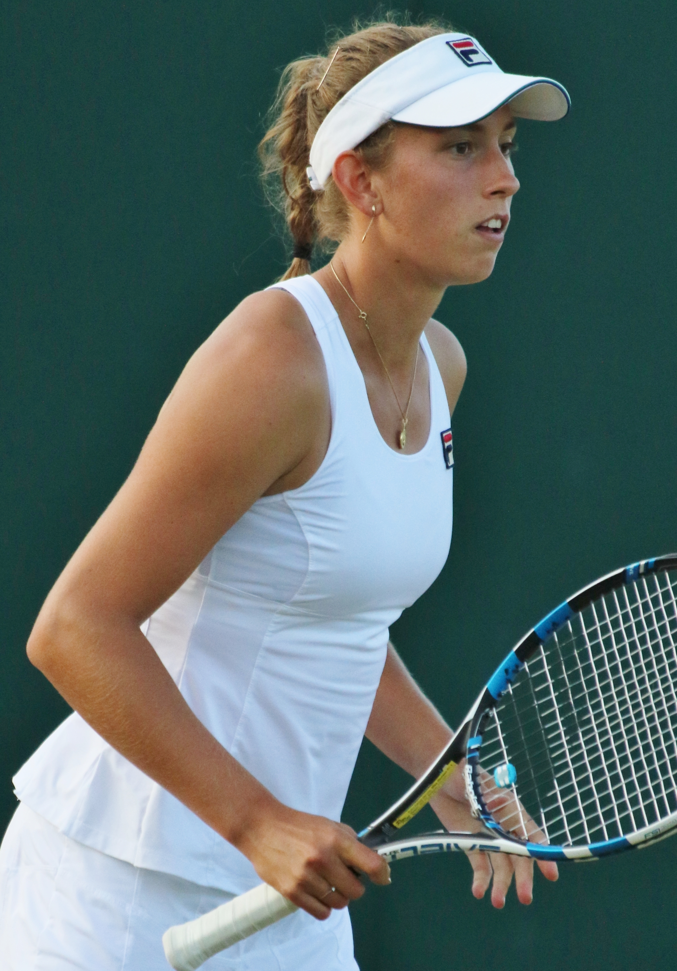 Mertens WM17 (15)